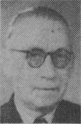 Arkitekten Dan Nilsson